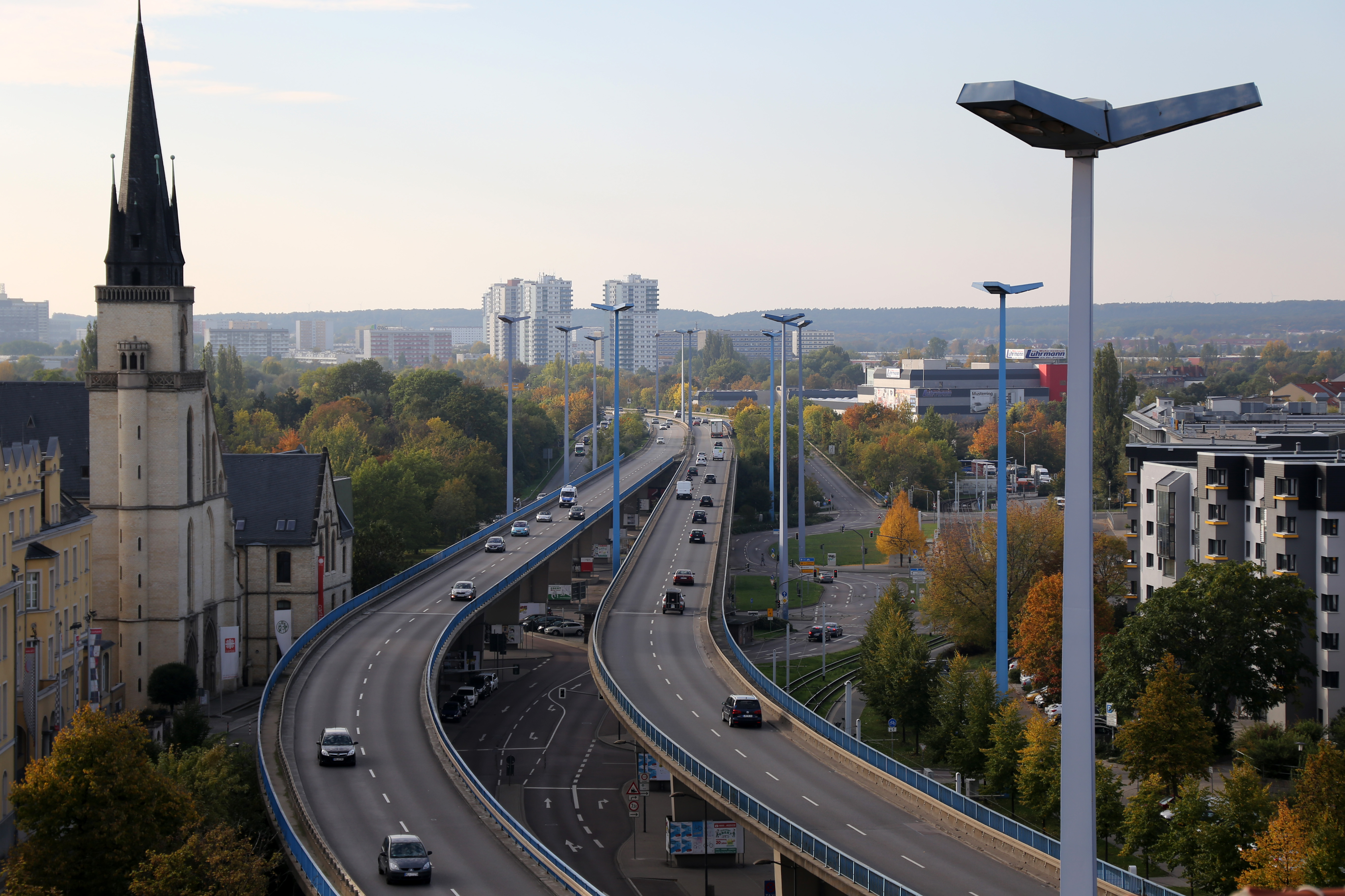 Die Bundesstraße 80 als Hochstraße im Stadtzentrum von Halle/Saale, Blickrichtung ist Westnordwest. Links im Bild zu sehen ist die Kirche St. Franziskus und St. Elisabeth. Im Bildhintergrund sind die Hochhäuser von Halle-Neustadt zu erkennen.